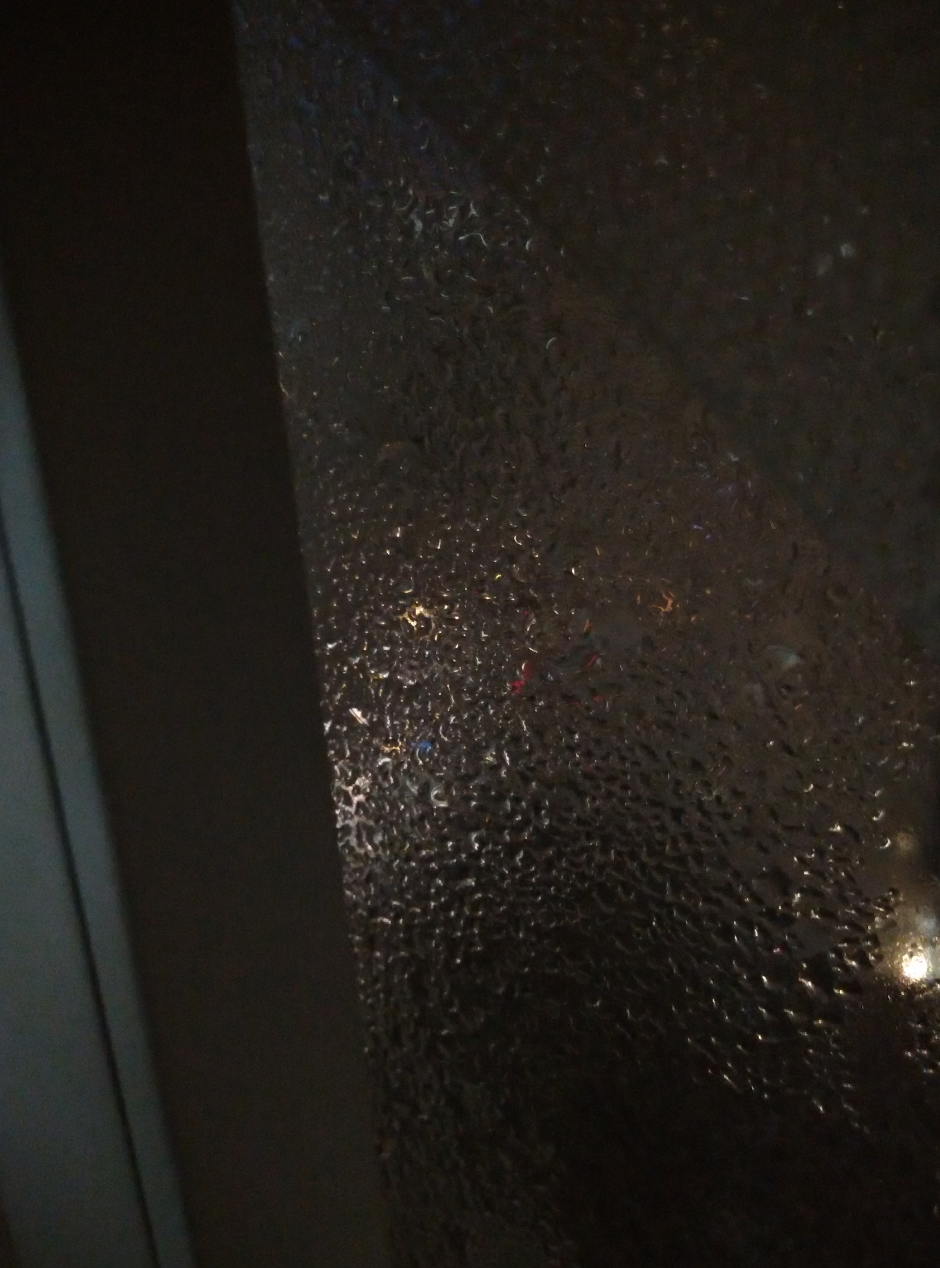 中文（香港）: 窗上的水點